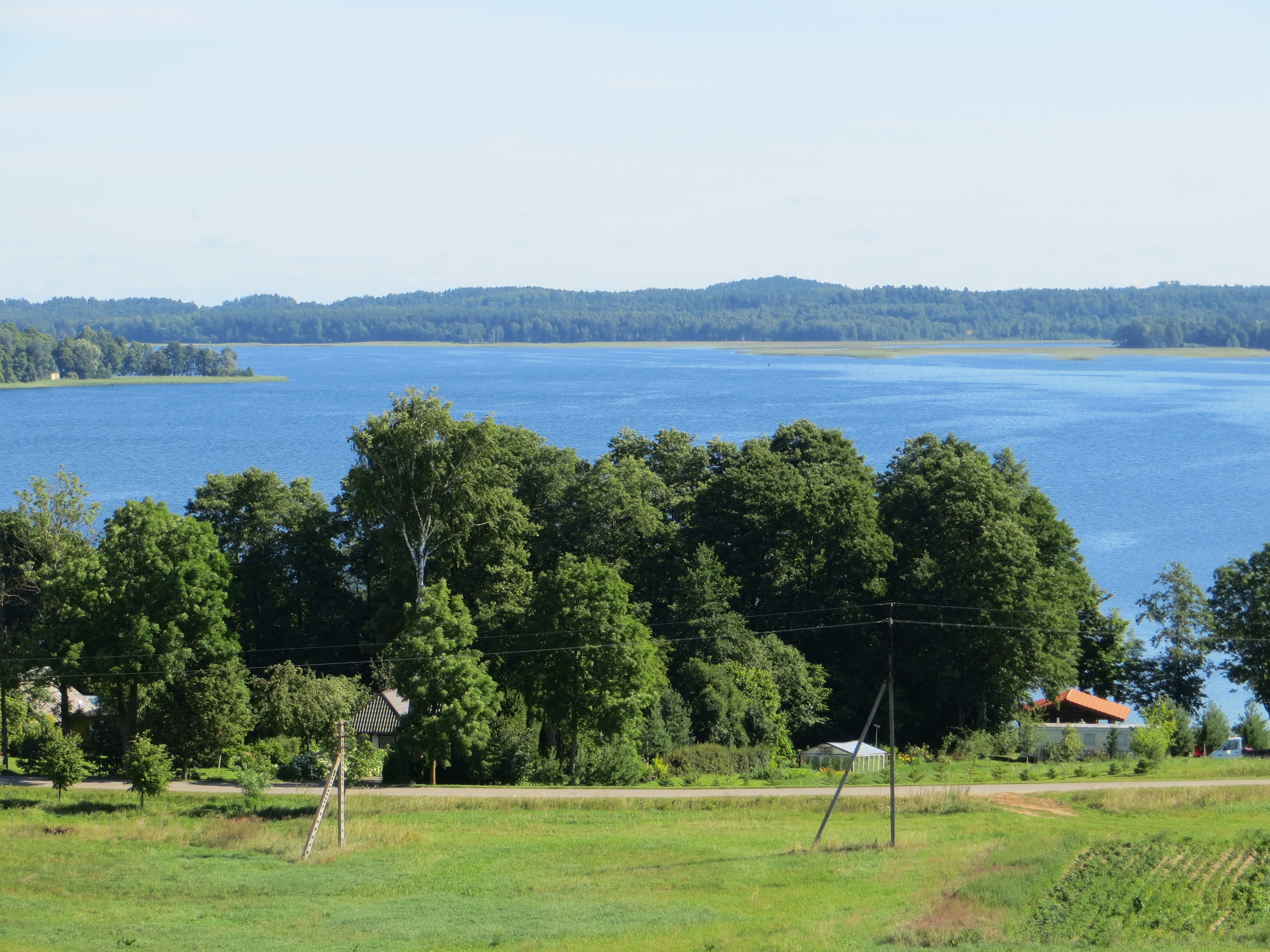 Sudeikiai, Lithuania